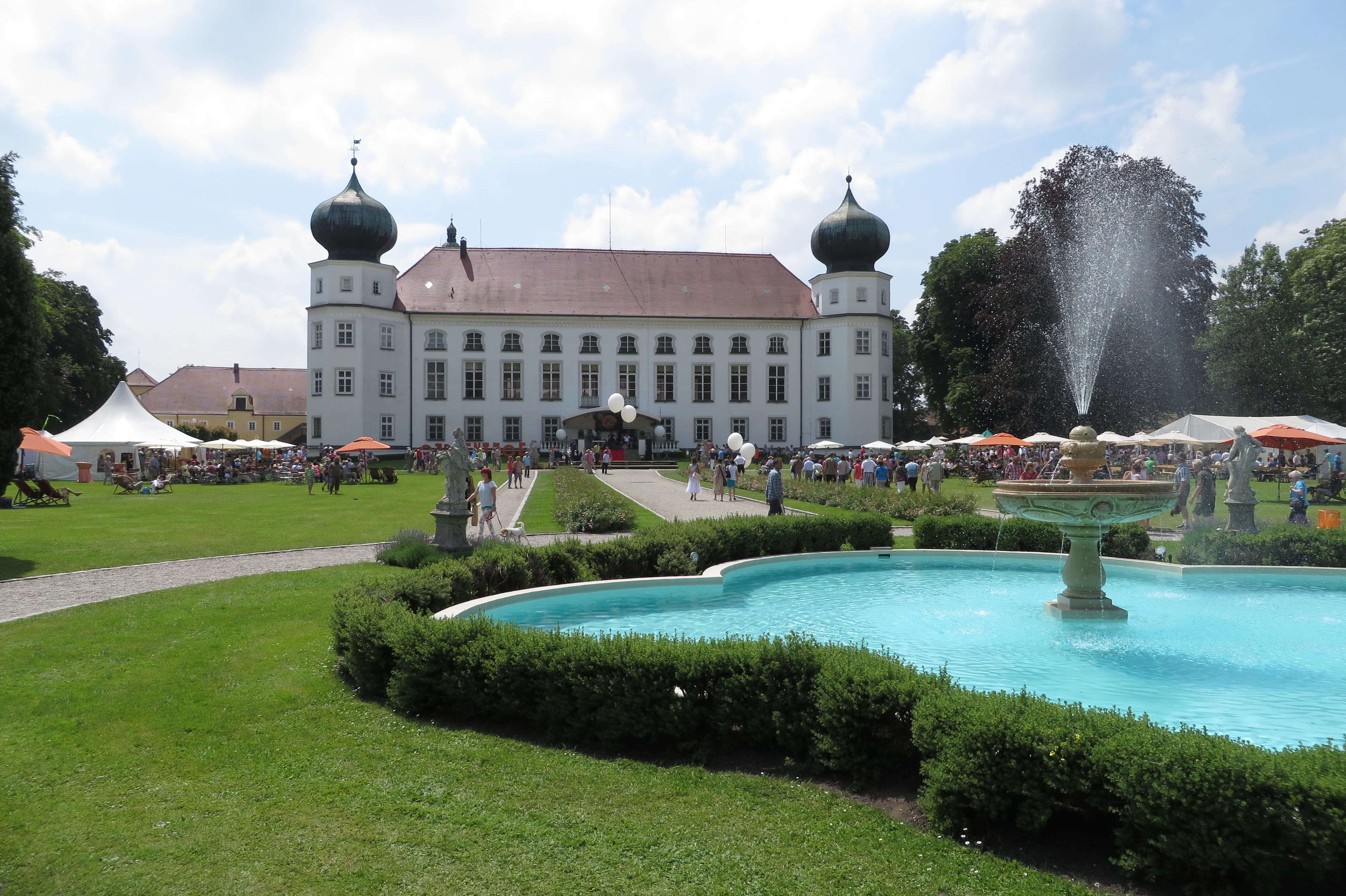 Gartentage auf Schloss Tüßling vom 5.–7. Juli 2013